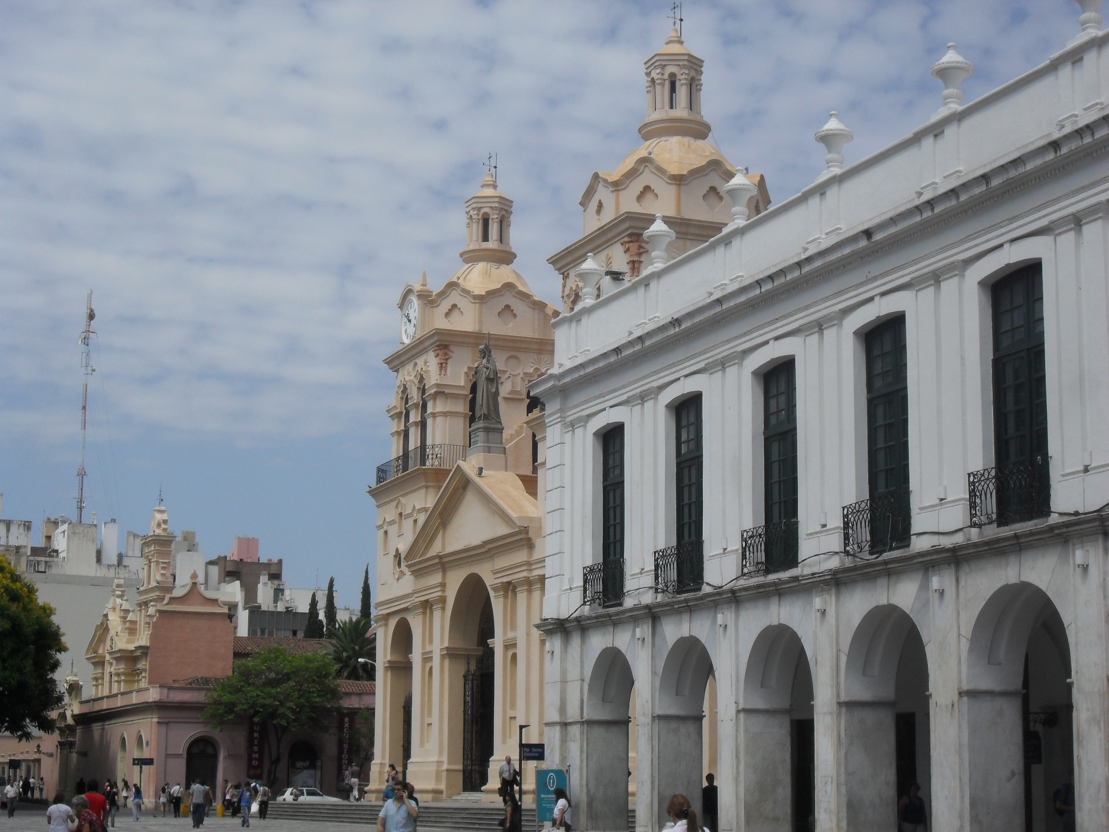 Vista del Cabildo y la Catedral, frente a Plaza San Martín.